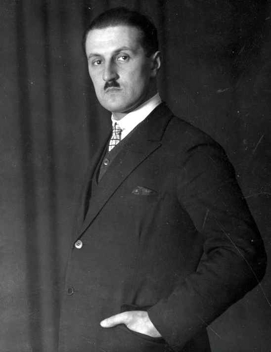 Witold Hulewicz